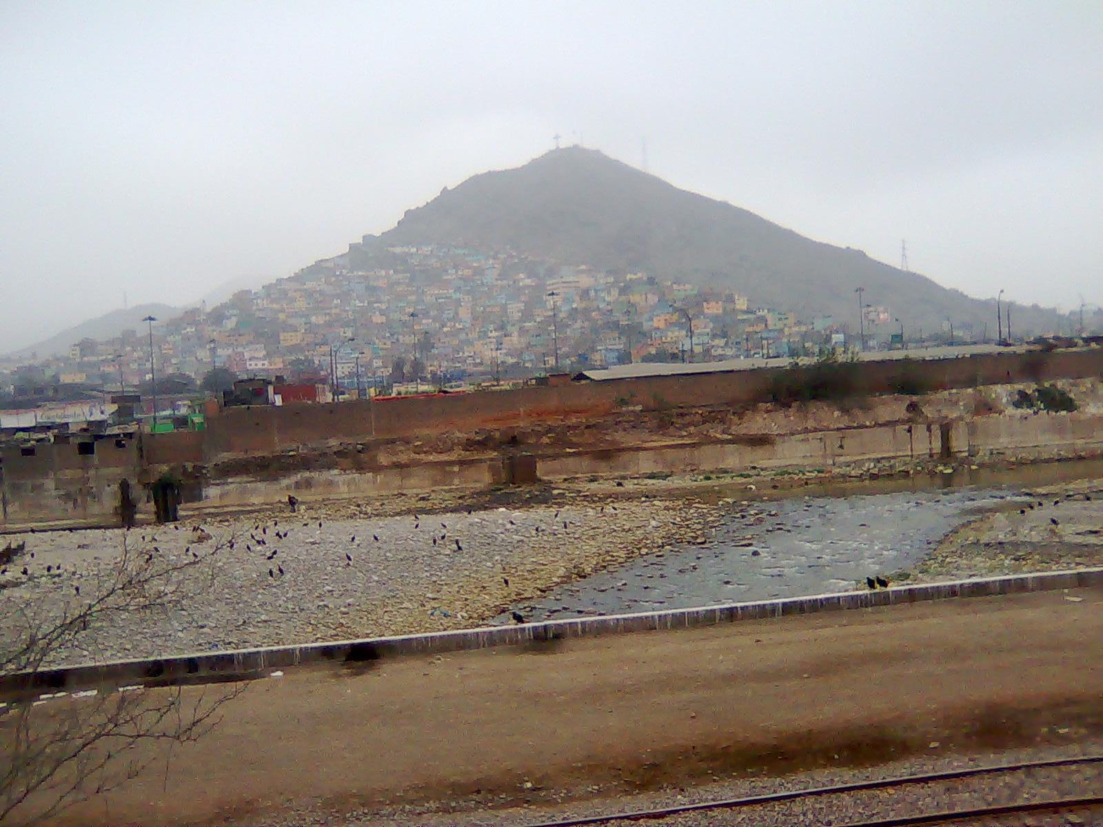 Fotografía del Río Rimac por el paso del Distrito de El Rimac (El Valle más industrial del Perú).